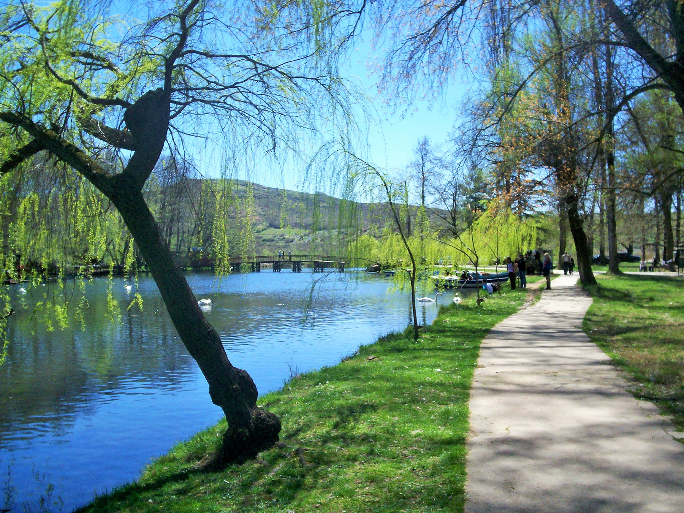 Pogradec, Pogradec